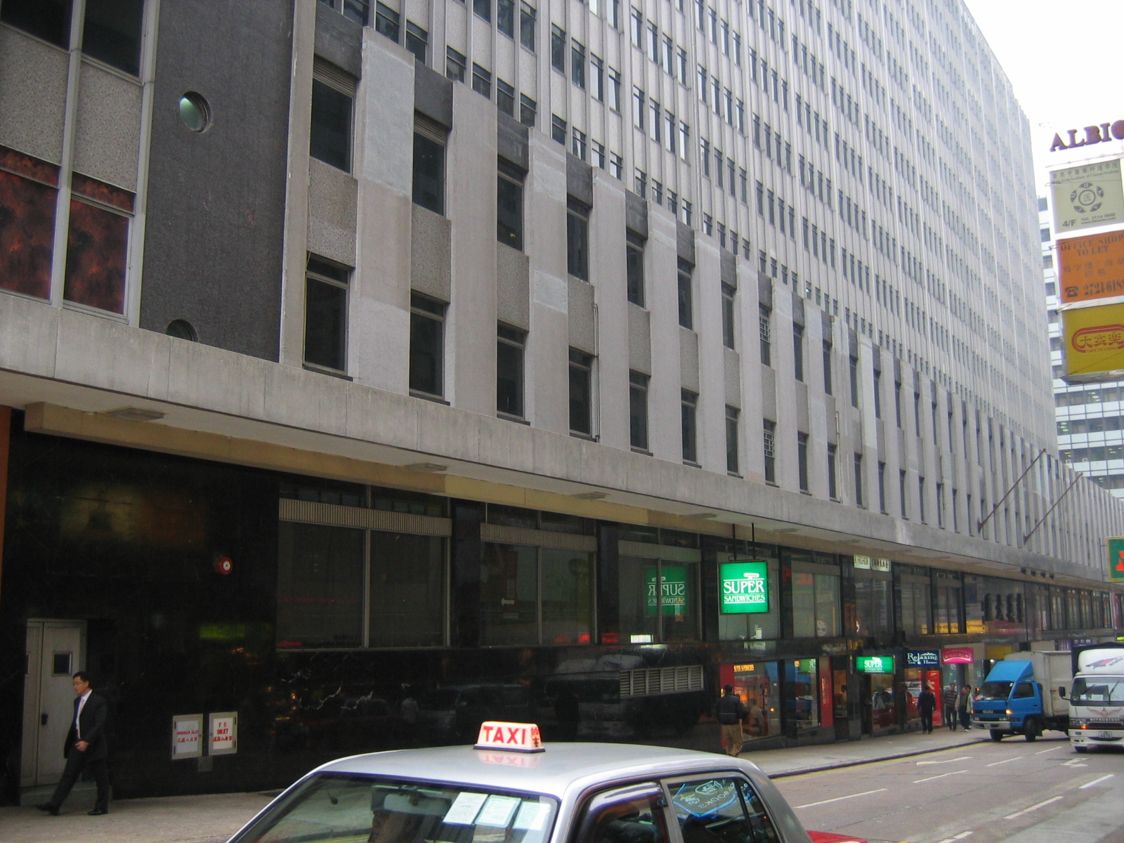 東英大廈 (2005年12月尾) 其位於香港九龍尖沙咀彌敦道,為一座商業大廈.